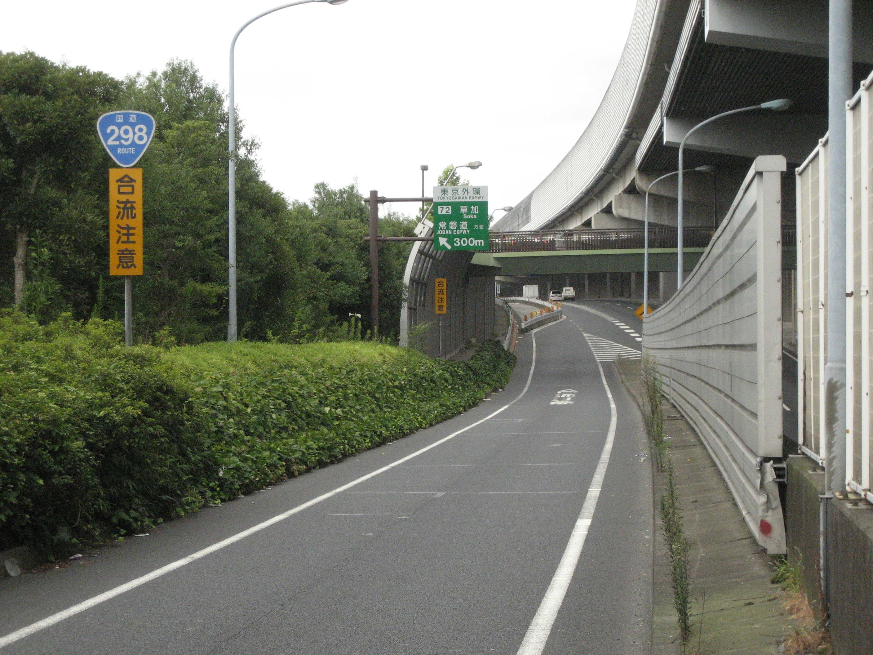 国道298号線の側道草加市新善町側道